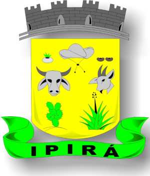 Brasão de Ipirá